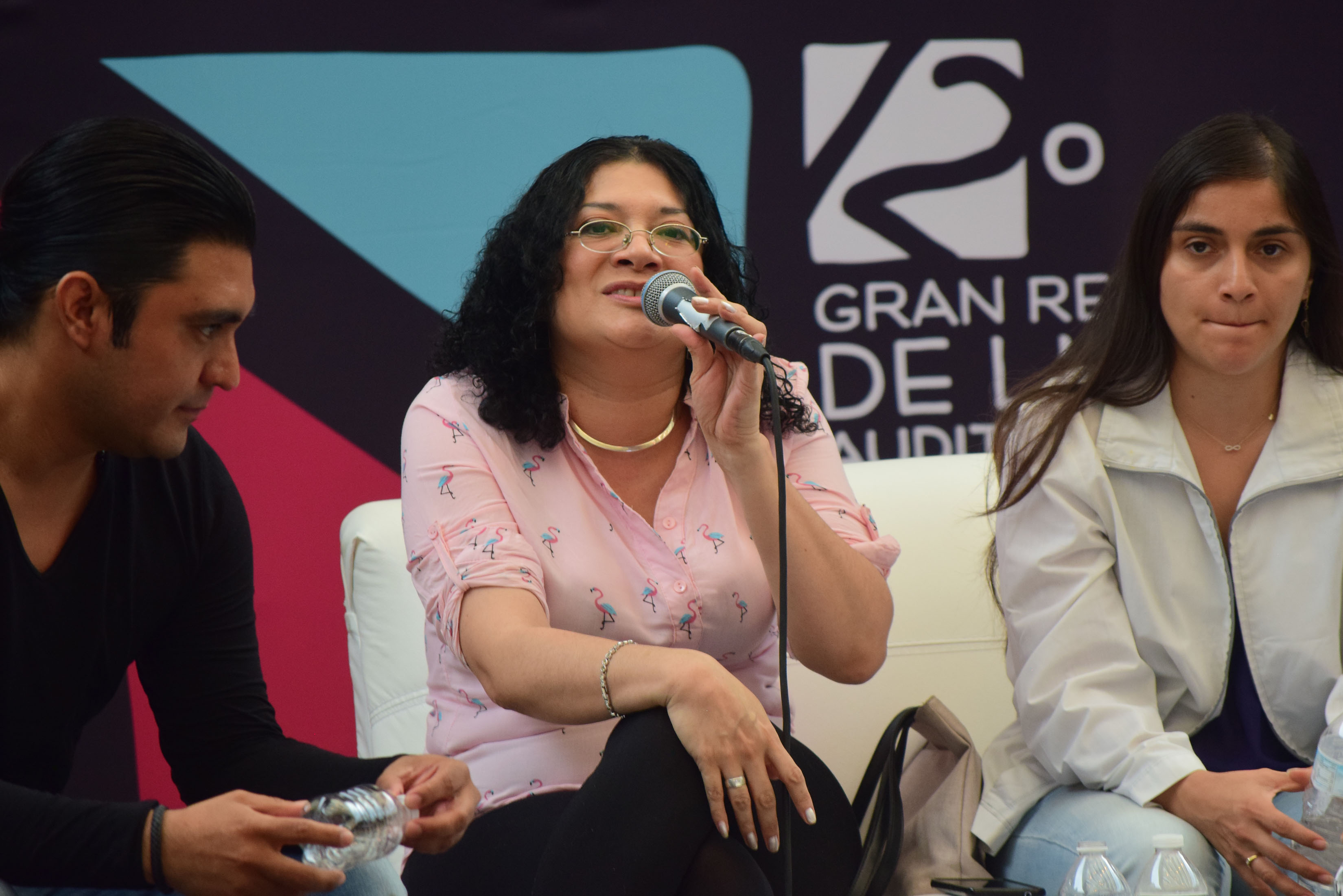 Martes 03 de abril de 2018. Como parte de las actividades del foro Juan José Arreola en el 12º Gran Remate de Libros del Auditorio Nacional, se presentó el recital a cargo de Gerardo Escalante, Rocío García Rey. Carmen Zenil y Gustavo Alatorre. Modera: Adriana Tafoya. Fotografía: Ixchel Solís / Secretaría de Cultura CDMX.